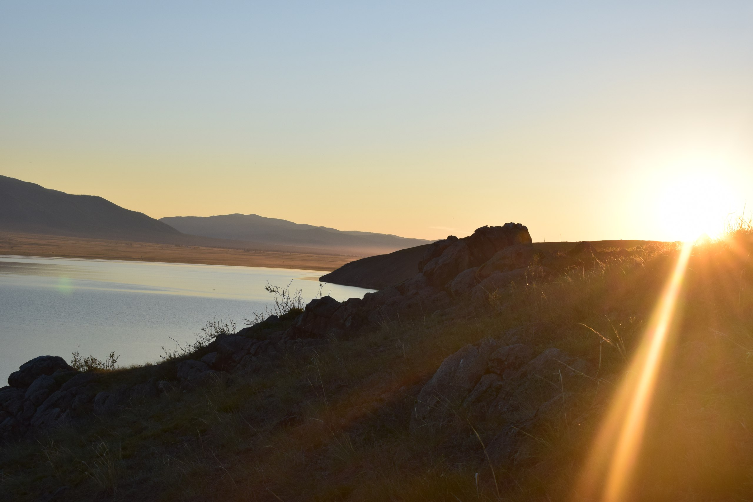 Закат на озере Чагытай, Республики Тыва